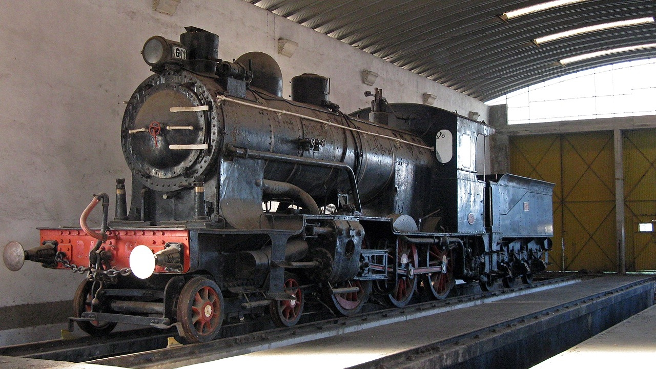 A BA61 pertencia à Companhia dos Caminhos-de-ferro Portugueses da Beira Alta, a empresa responsável na Linha da Beira Alta nas suas primeiras décadas. Actualmente, apenas restam duas locomotivas a vapor desta companhia: A BA101 que se encontra em exposição dentro de um edifício de vidro um pouco acima da estação de Vilar Formoso (junto à fronteira com Espanha) e esta, a BA61 que se encontra à espera de dias melhores dentro deste barracão na Pampilhosa.